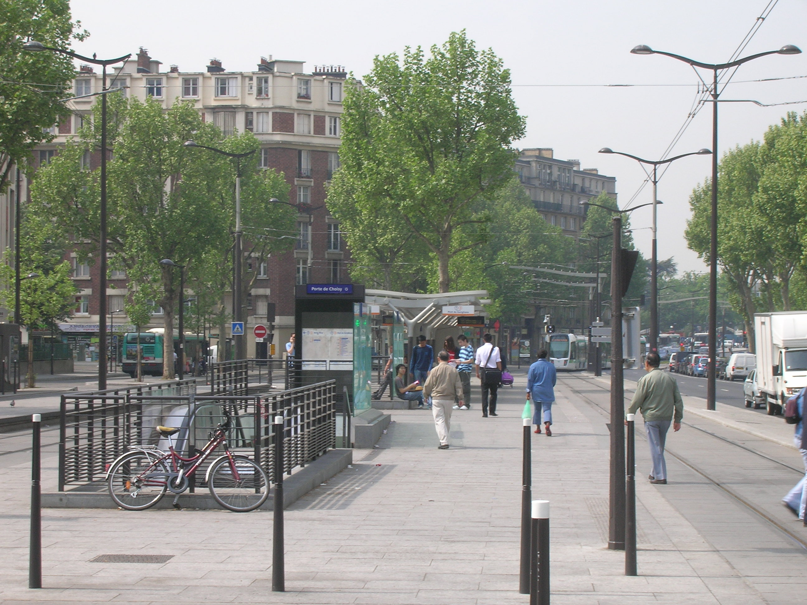 Station de tramway ligne T3 et accès de la station de métro Porte de Choisy ligne 7, Paris